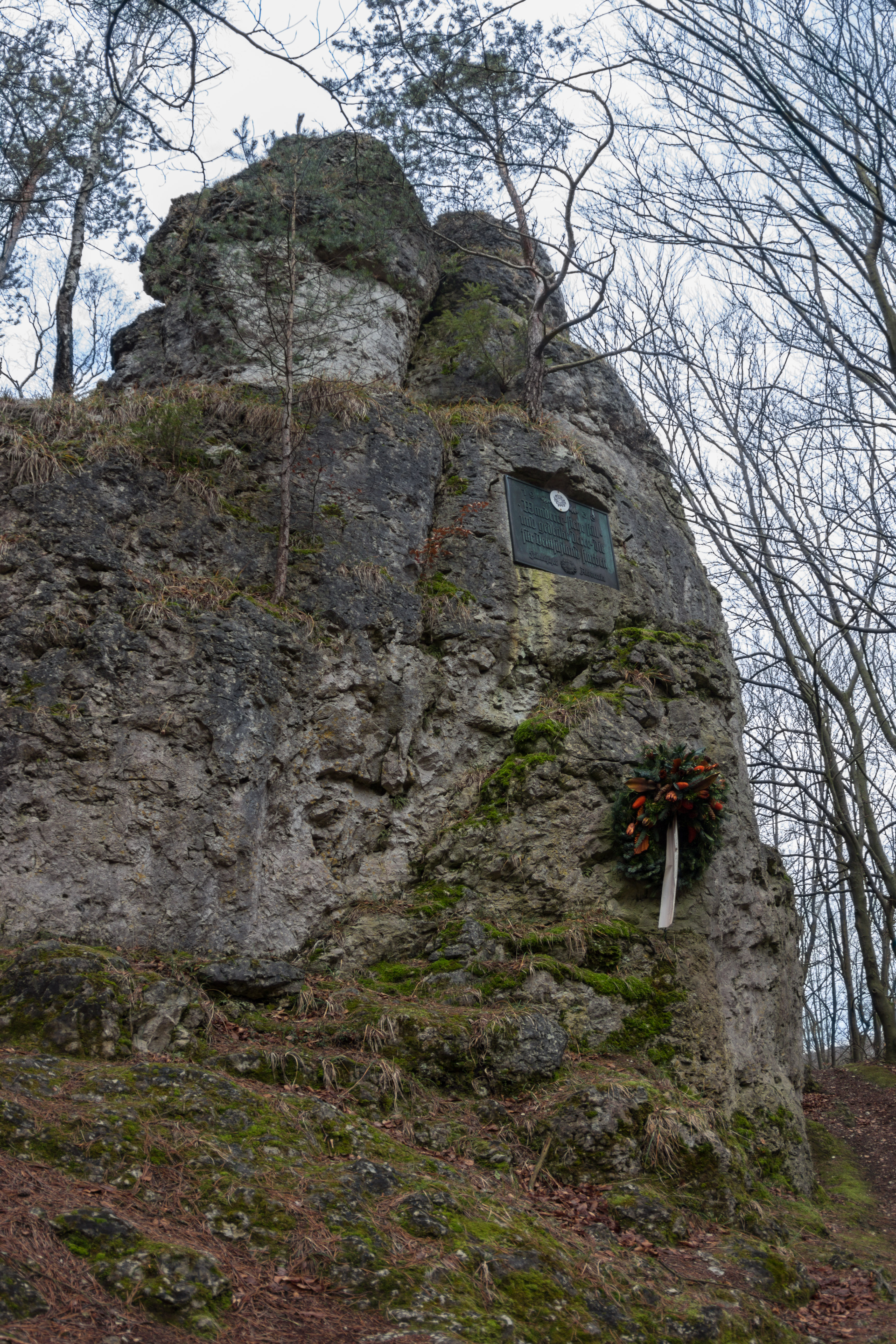 Brunnfels, Hirschbach, LSG innerhalb des Naturparks Fränkische Schweiz - Veldensteiner Forst (ehemals Schutzzone)